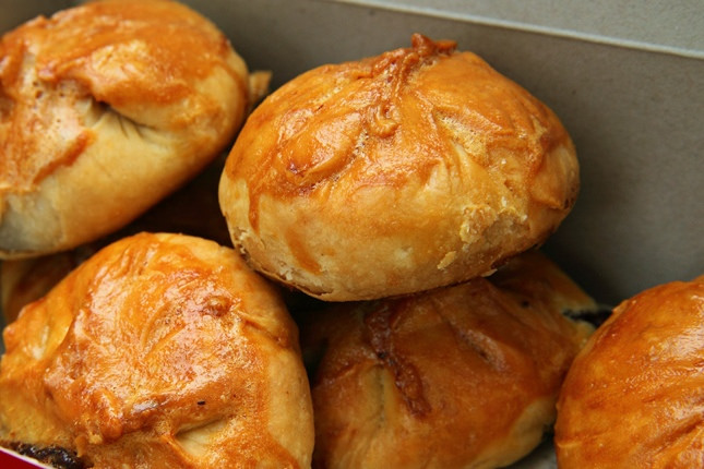 seremban sieu pau